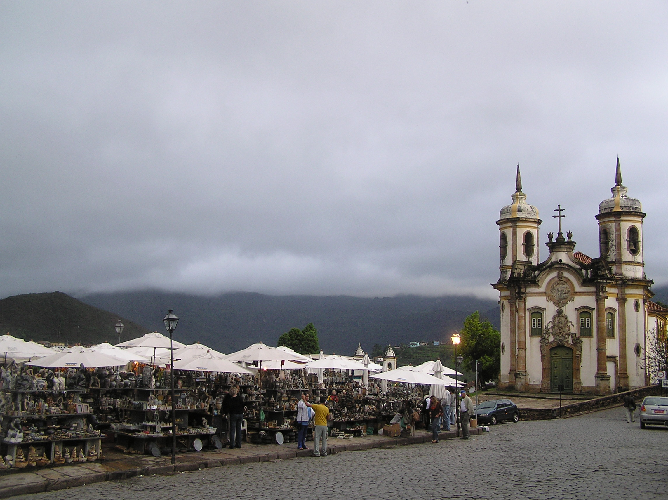 Igreja de São Francisco de Assis(Church of São Francisco de Assis)